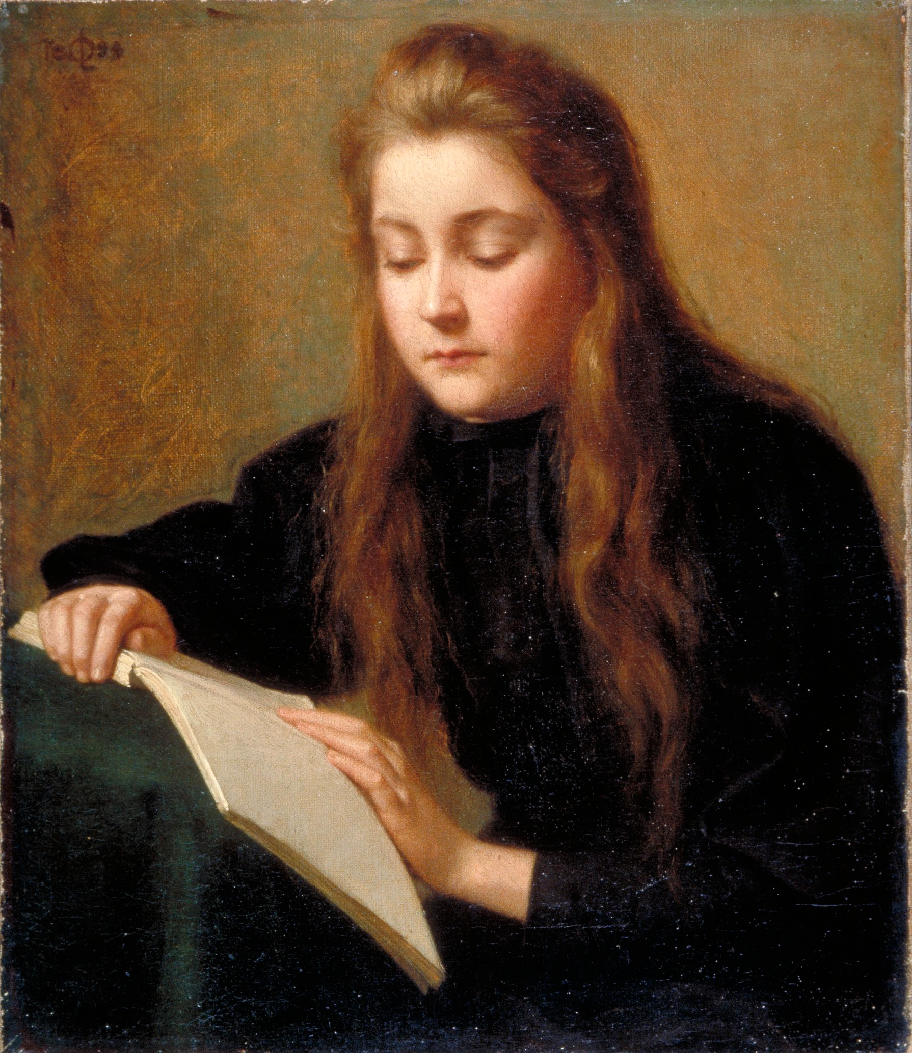 La Liseuse